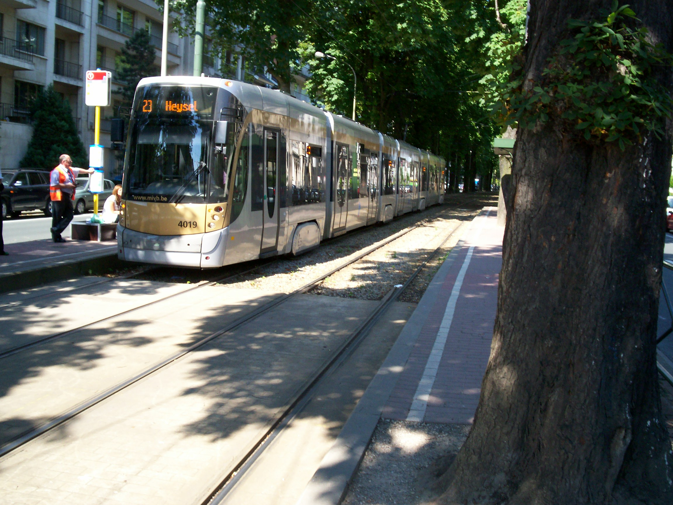 T 4000 de la ligne 23 à Churchill et à destination du Heysel